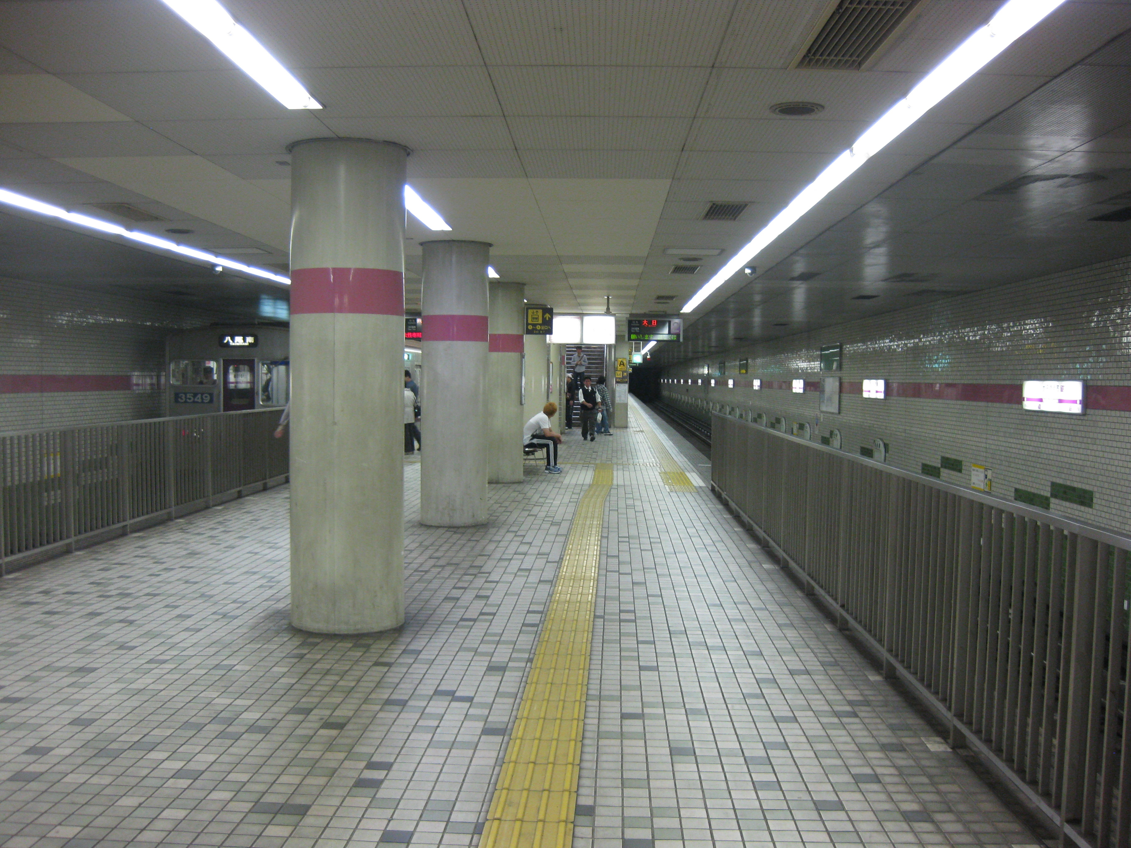 地下鉄谷町線太子橋今市駅プラットホーム